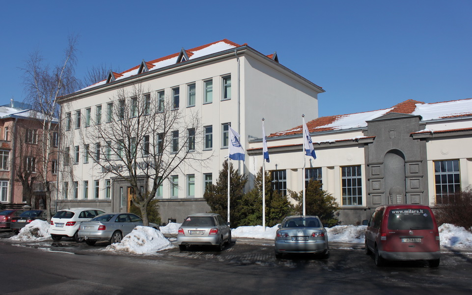 Kauno vandenys.